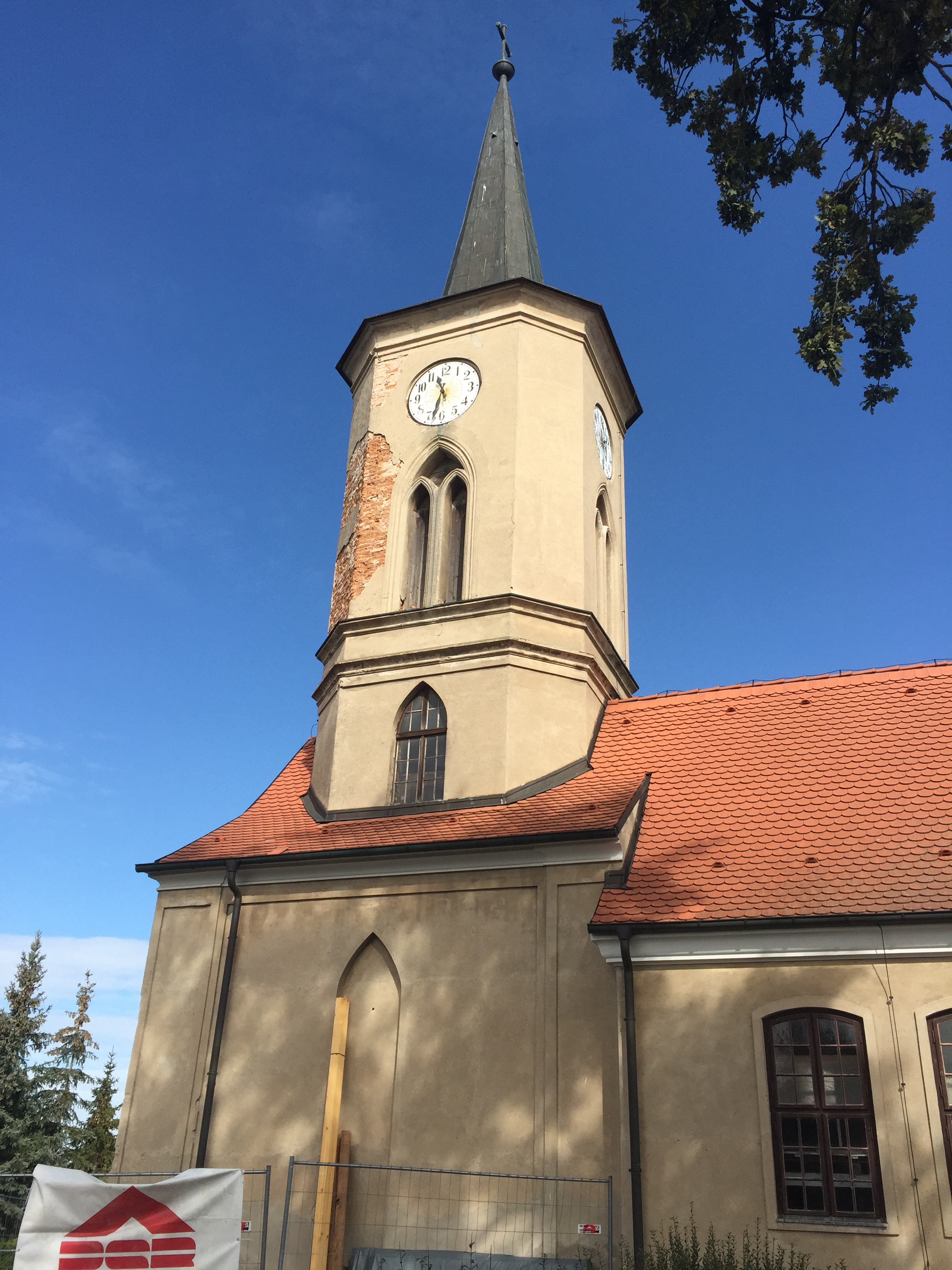 Die Dorfkirche in Krielow der Gemeinde Groß Kreuz (Havel) entstand im Jahr 1698. Im Innern steht unter anderem ein Kanzelkorb aus diesem Jahr.